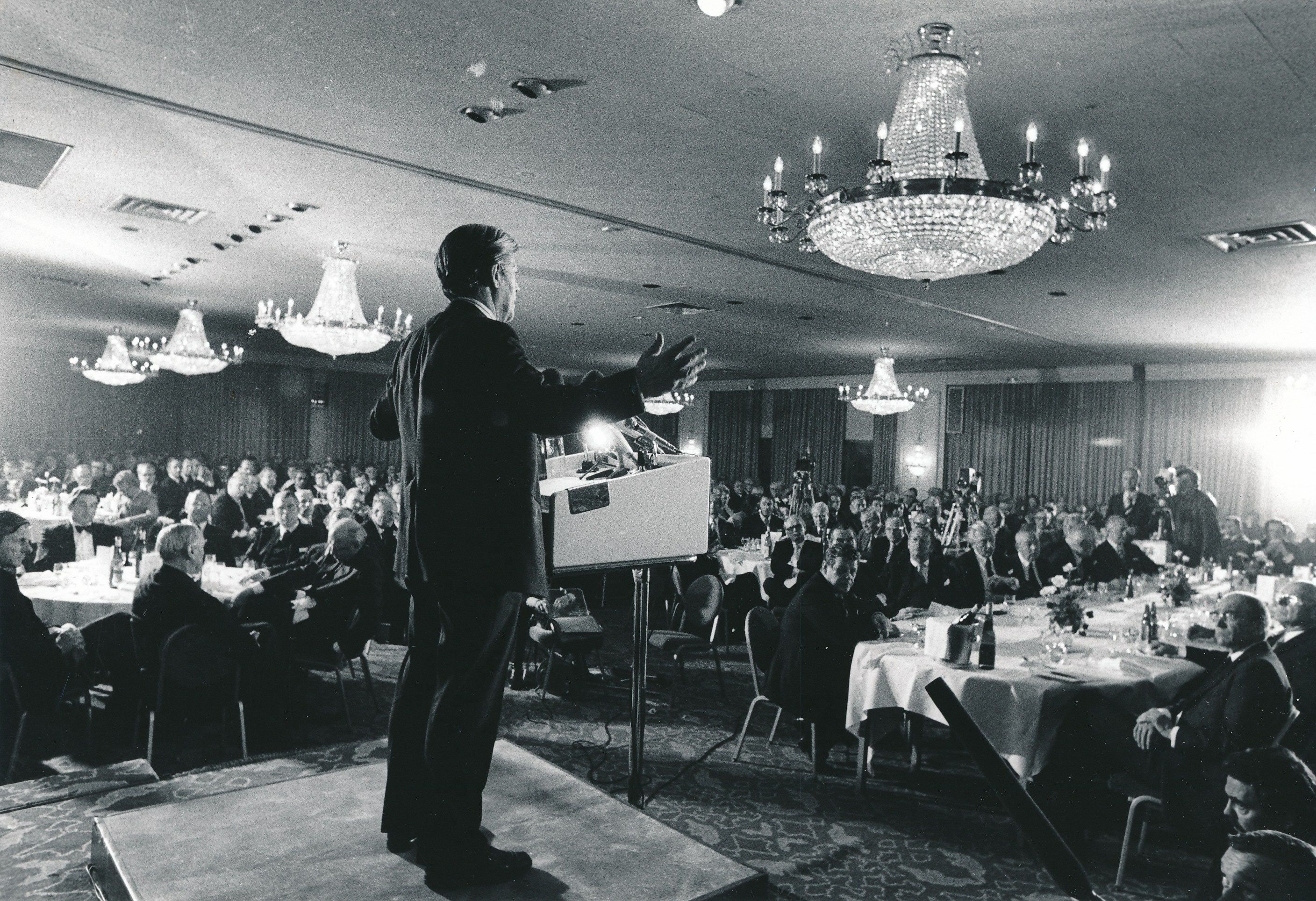 Helmut Schmidt auf der BDI-Jahrestagung 1974 in Köln © BDI/Wolf P. Prange